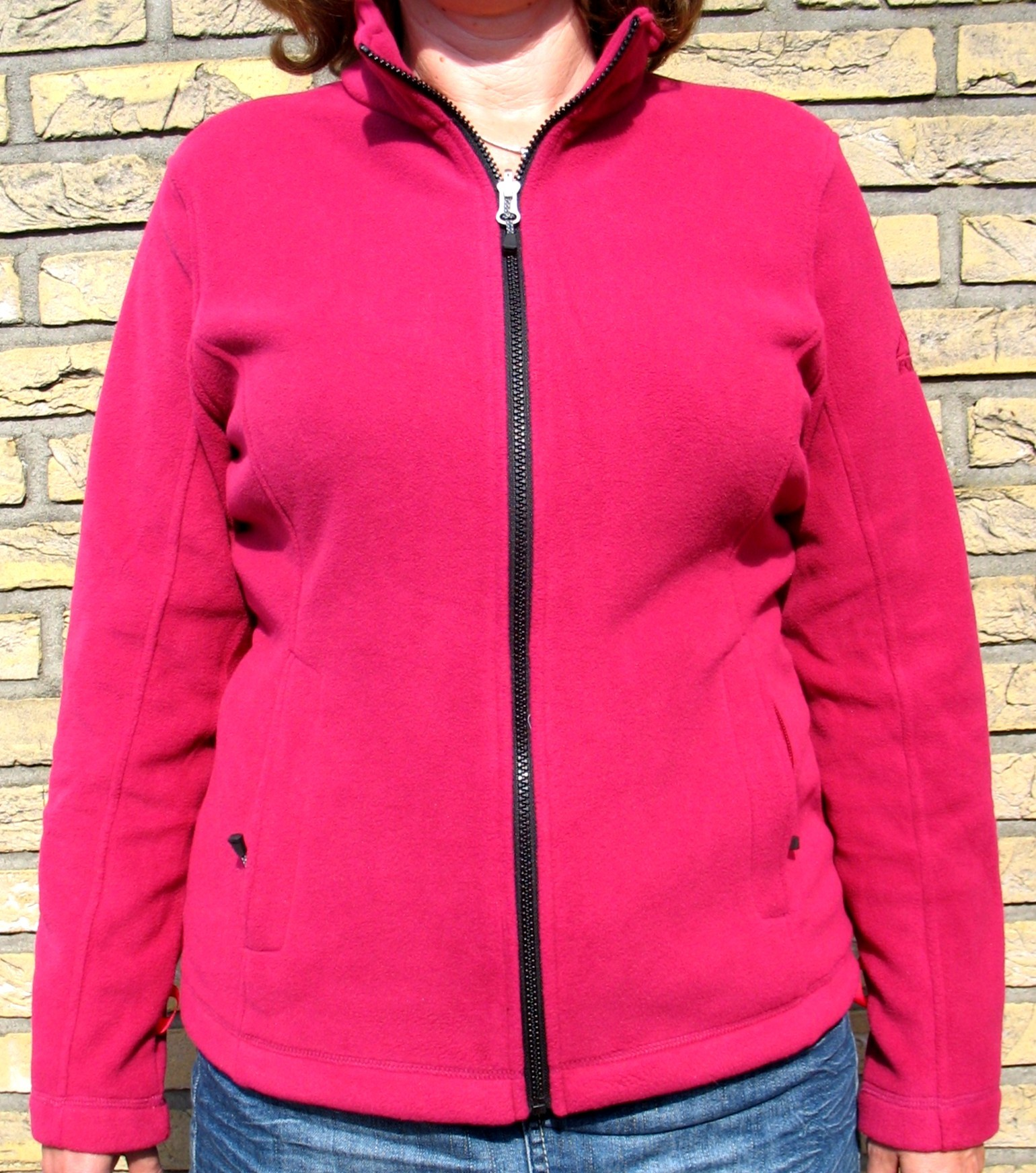 Fleecejacke